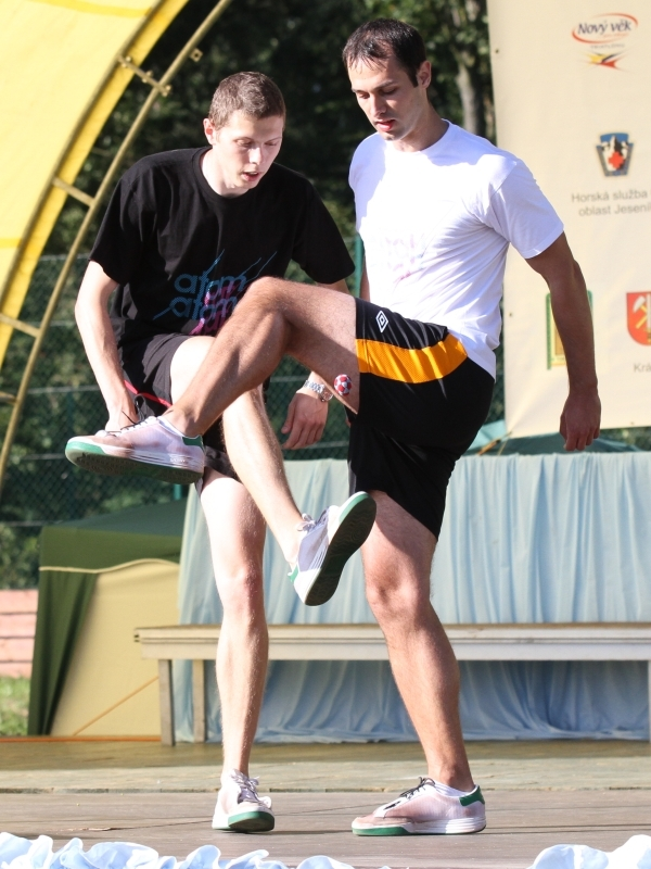 Několikanásobní mistři světa a Evropy ve footbagu dvojic Martin Sládek a Tomáš Tuček